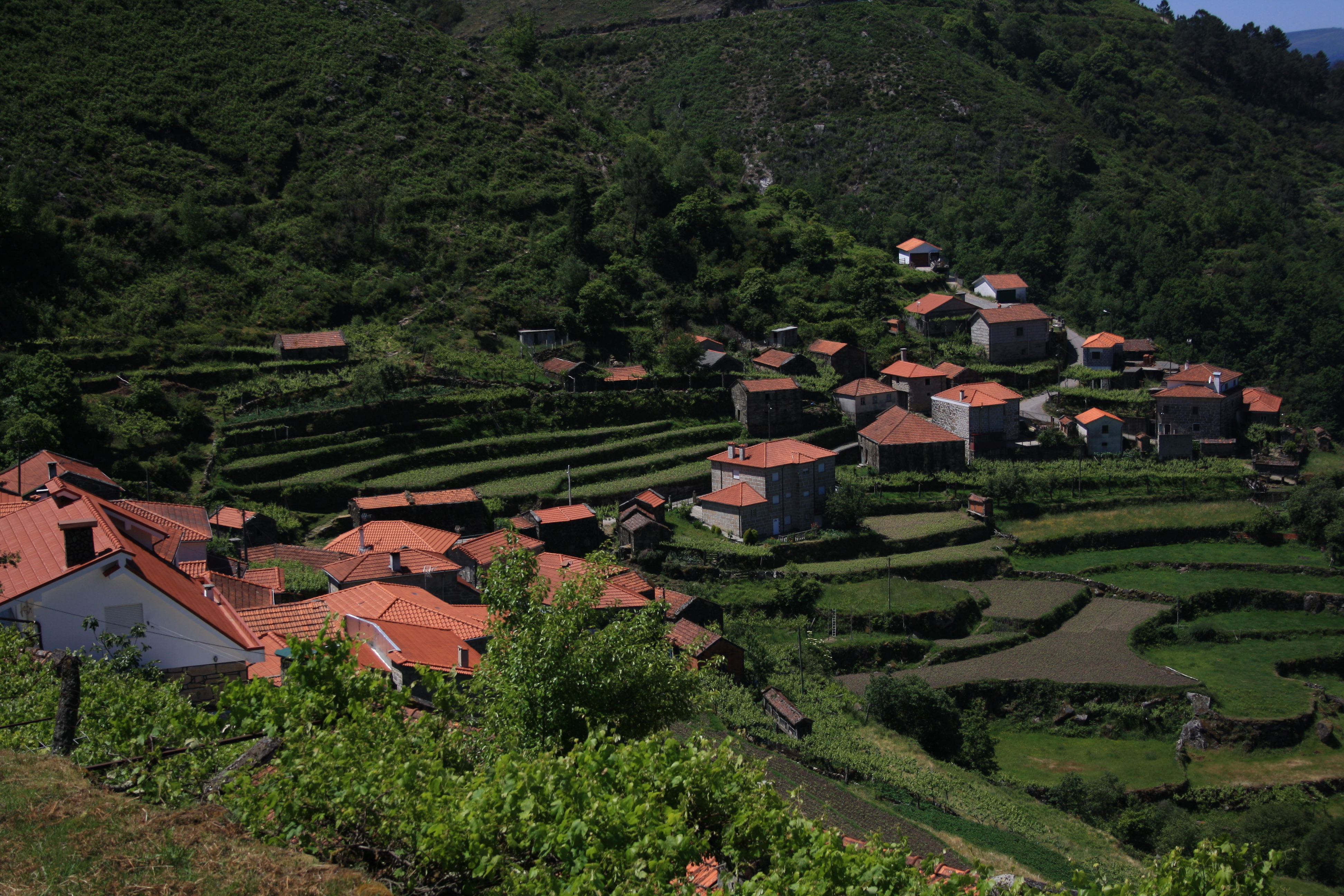 Desde el alto de Porta Cova